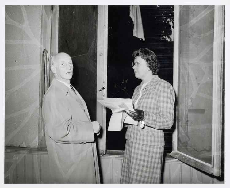 Otto Frank (vader van Anne Frank) in het Achterhuis in gesprek met Miep, 9 mei 1958 Foto Ben van Meerendonk / AHF, collectie IISG, Amsterdam Afdruk van 4x5 inch negatief aangetast door het azijnzuur-syndroom